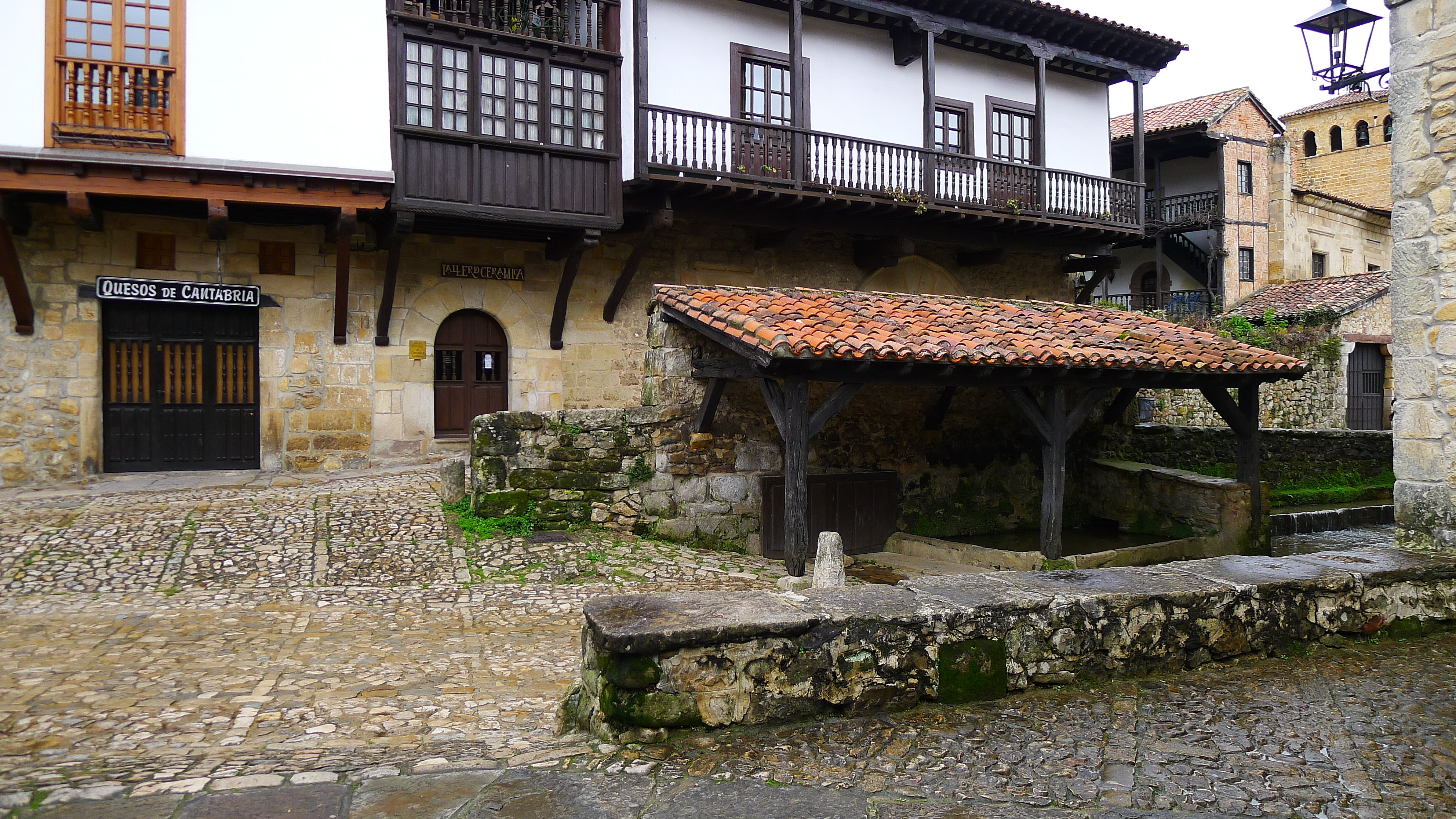 Abrevadero necesario para el ganado que cruza Santillana del Mar